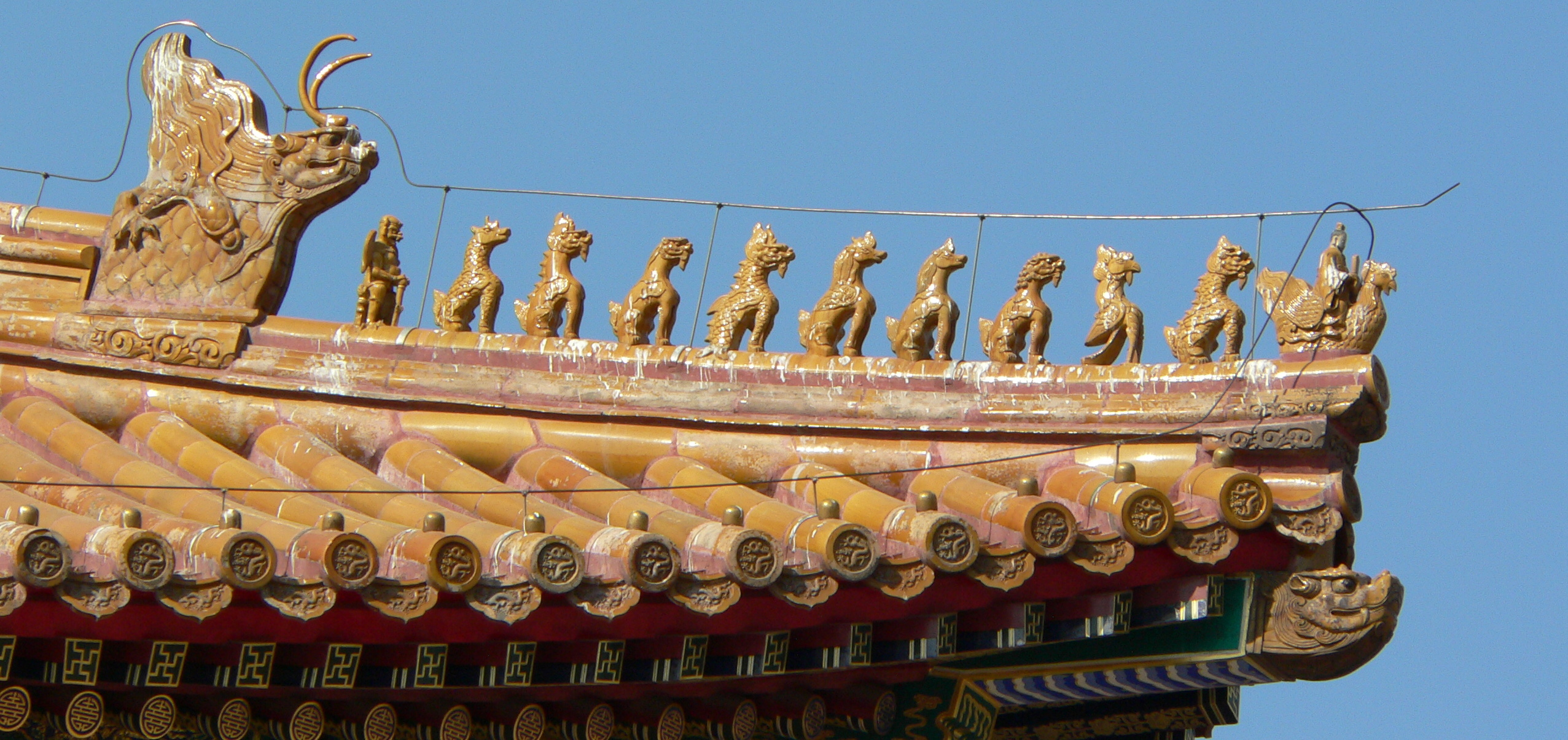 太和殿屋顶上的仙人走兽